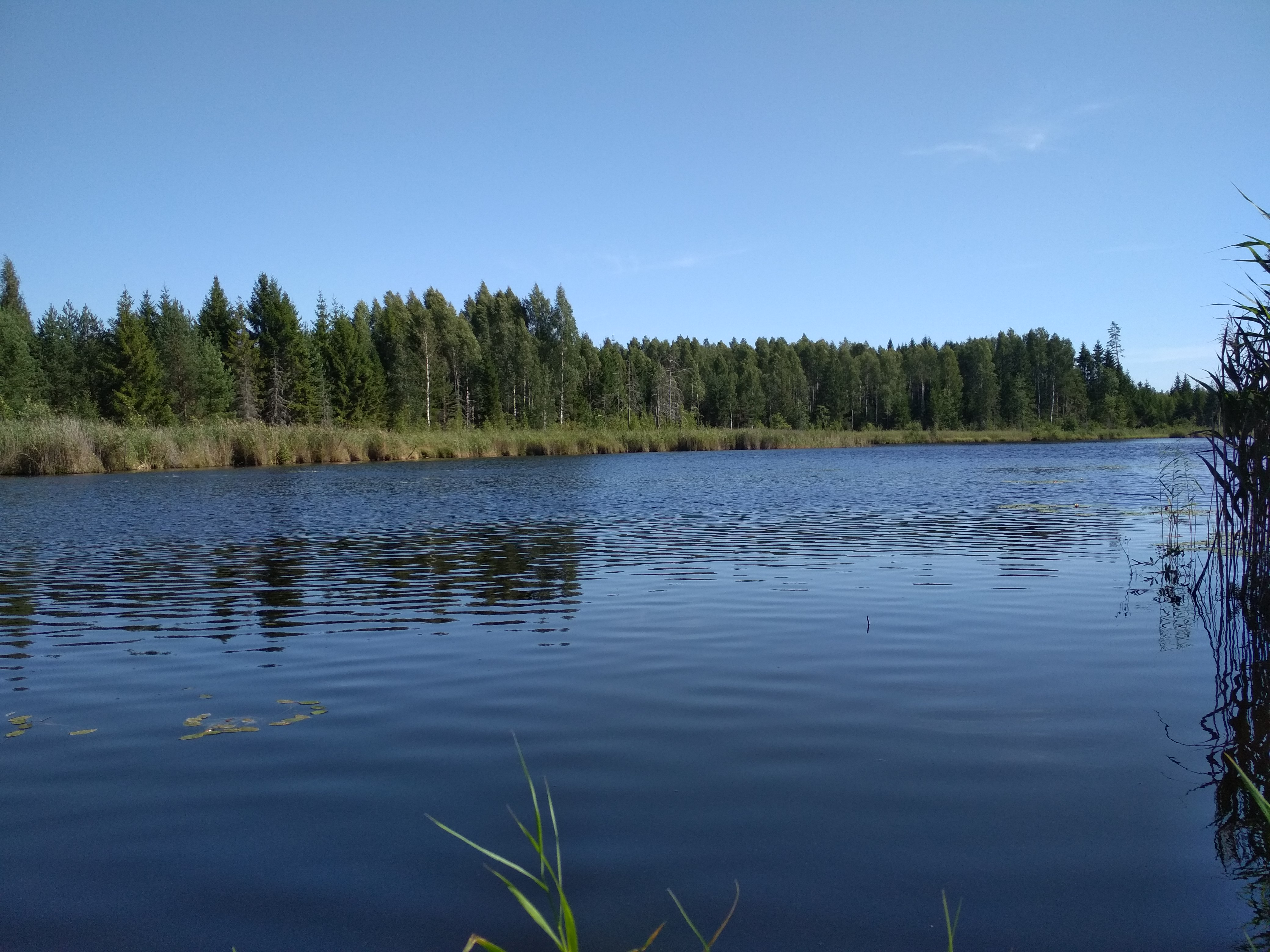 Nihujärv Tõrva vallas